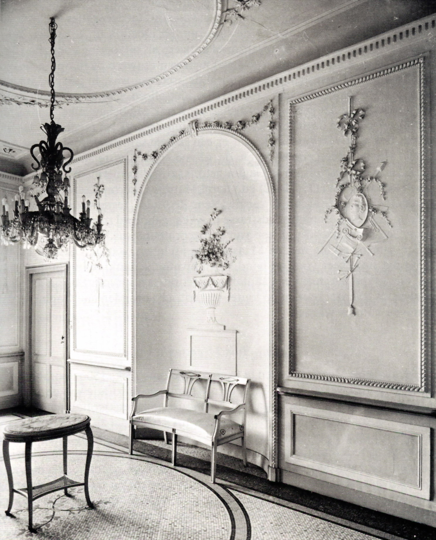 Vestibule kasteel Meerssenhoven, Maastricht-Itteren. Ontwerp: Mathias Soiron. Sierstucwerk: waarschijnlijk Petrus Nicolaas Gagini (ca.1800).